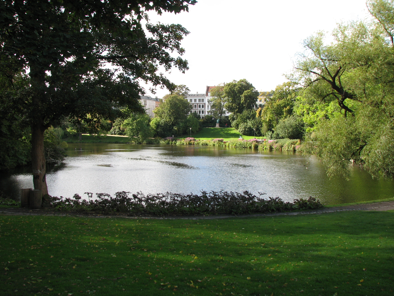 Ørstedsparken